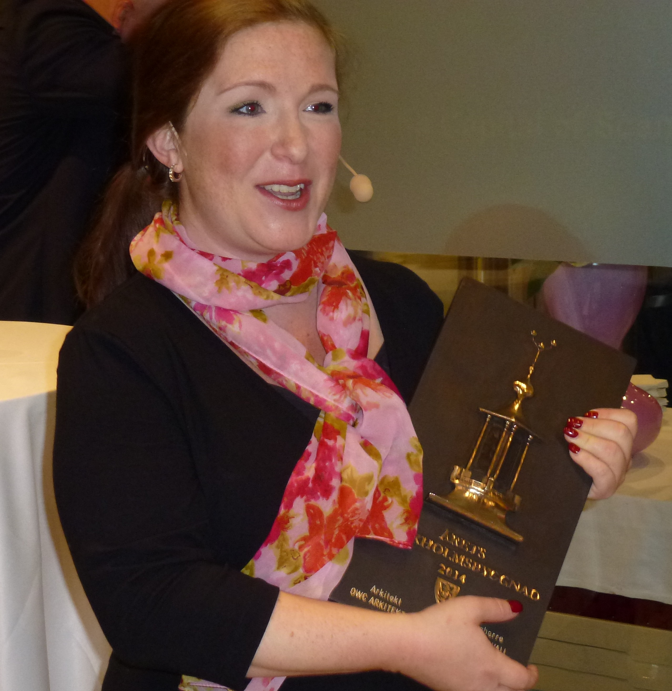 Regina Kevius med Årets Stockholmsbyggnad plakett 2014